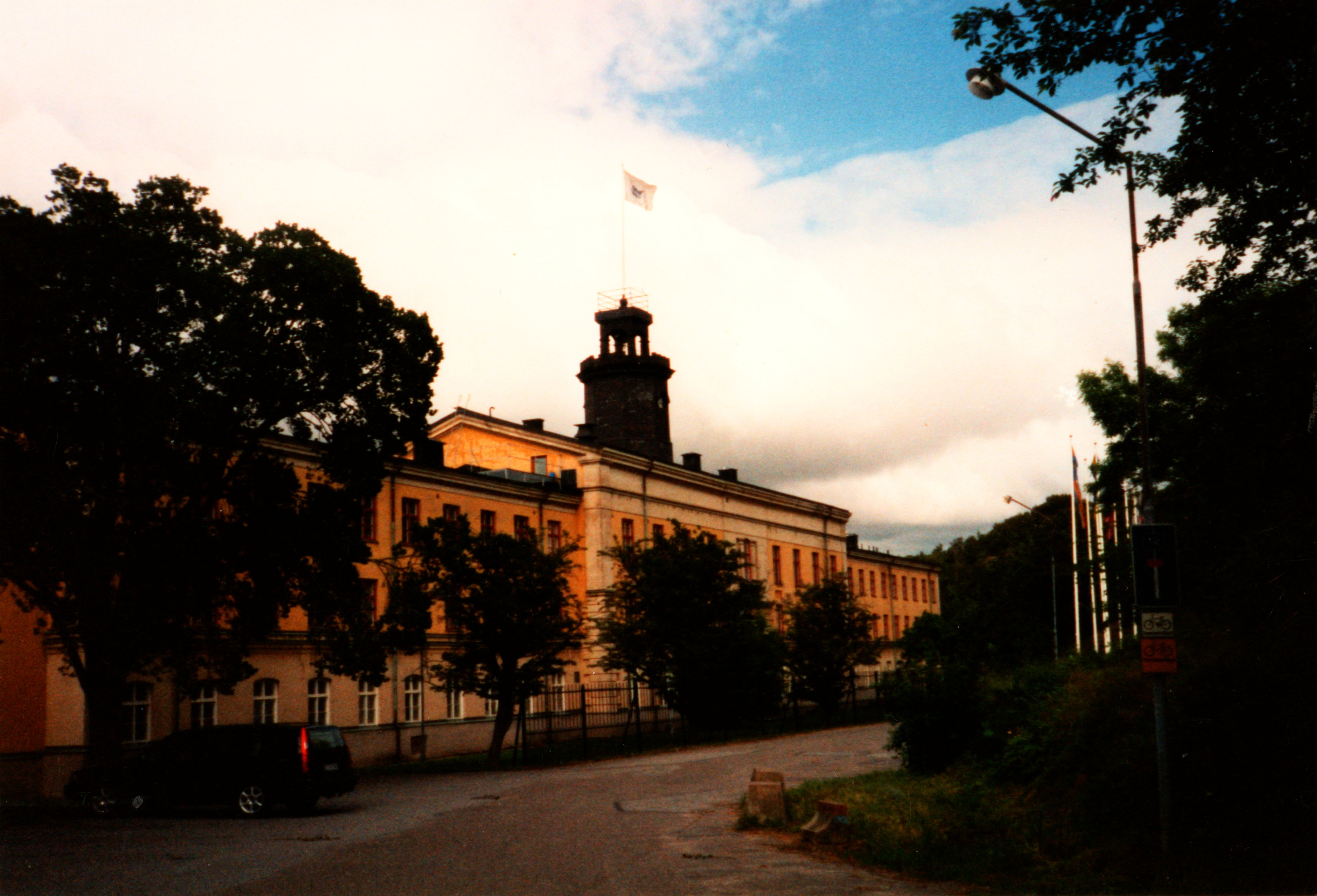 Nordiska hälsovårdshögskolan, Göteborg, ca 1990